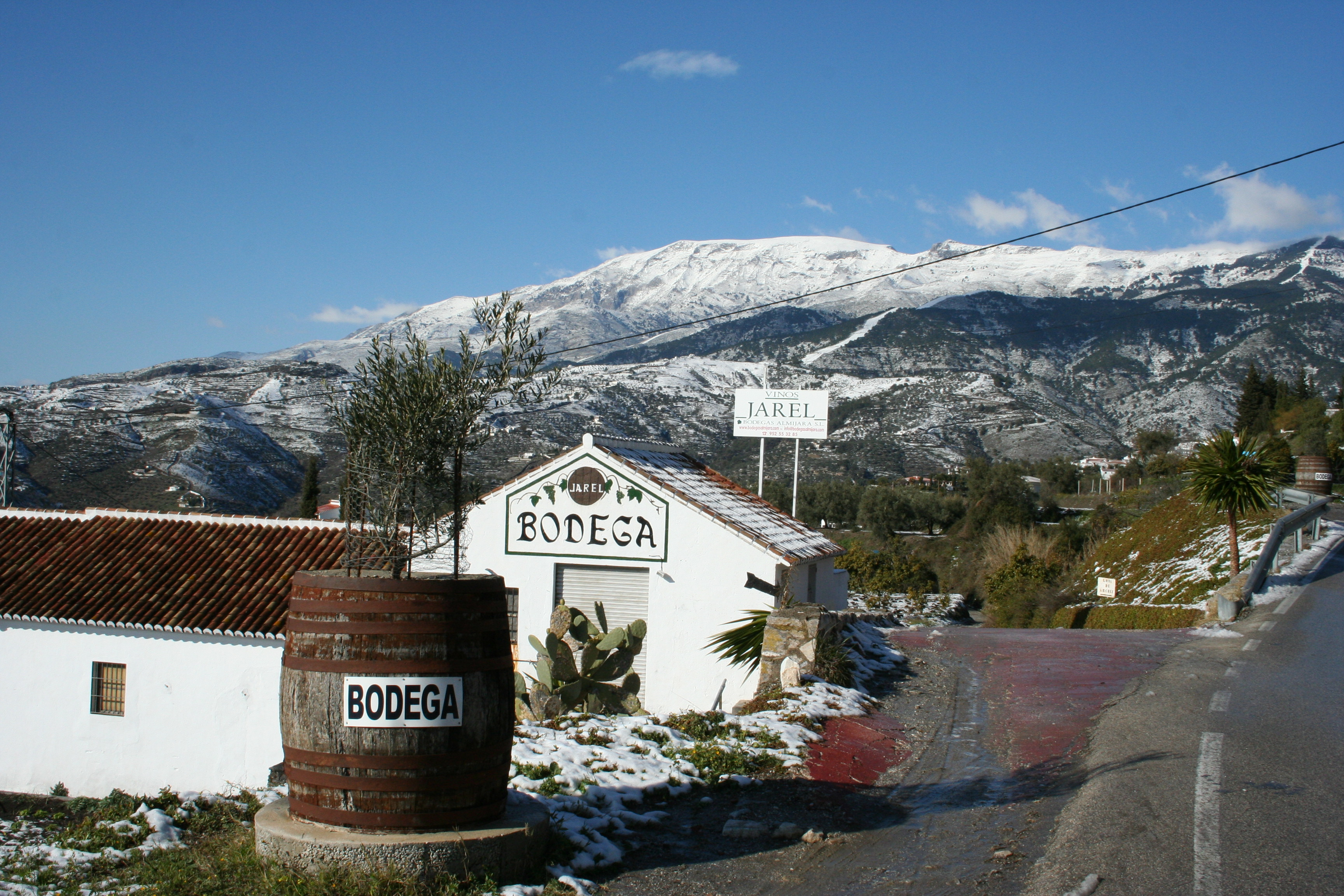 Bodega en Cómpeta, provincia de Málaga, España.